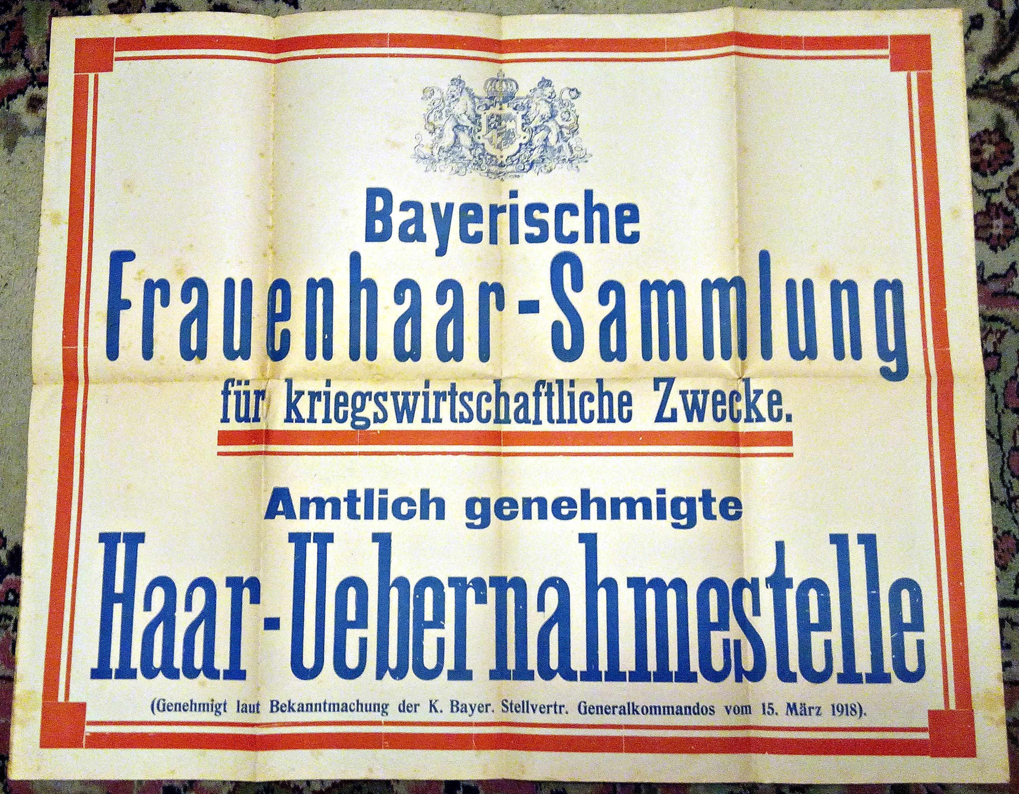 Bayerische Frauenhaar Sammlung 1918, eigenes Foto von eigenem alten Plakat